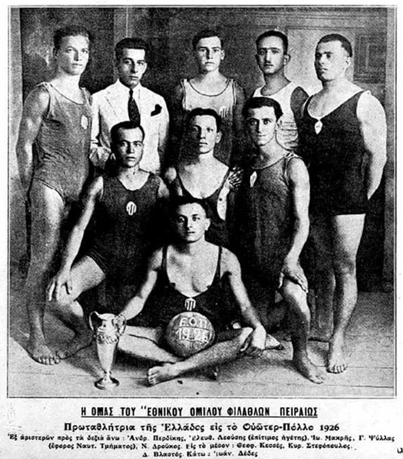 Η ομάδα υδατοσφαίρισης του Εθνικού Πειραιώς πρωταθλήτρια Ελλάδας για το 1926